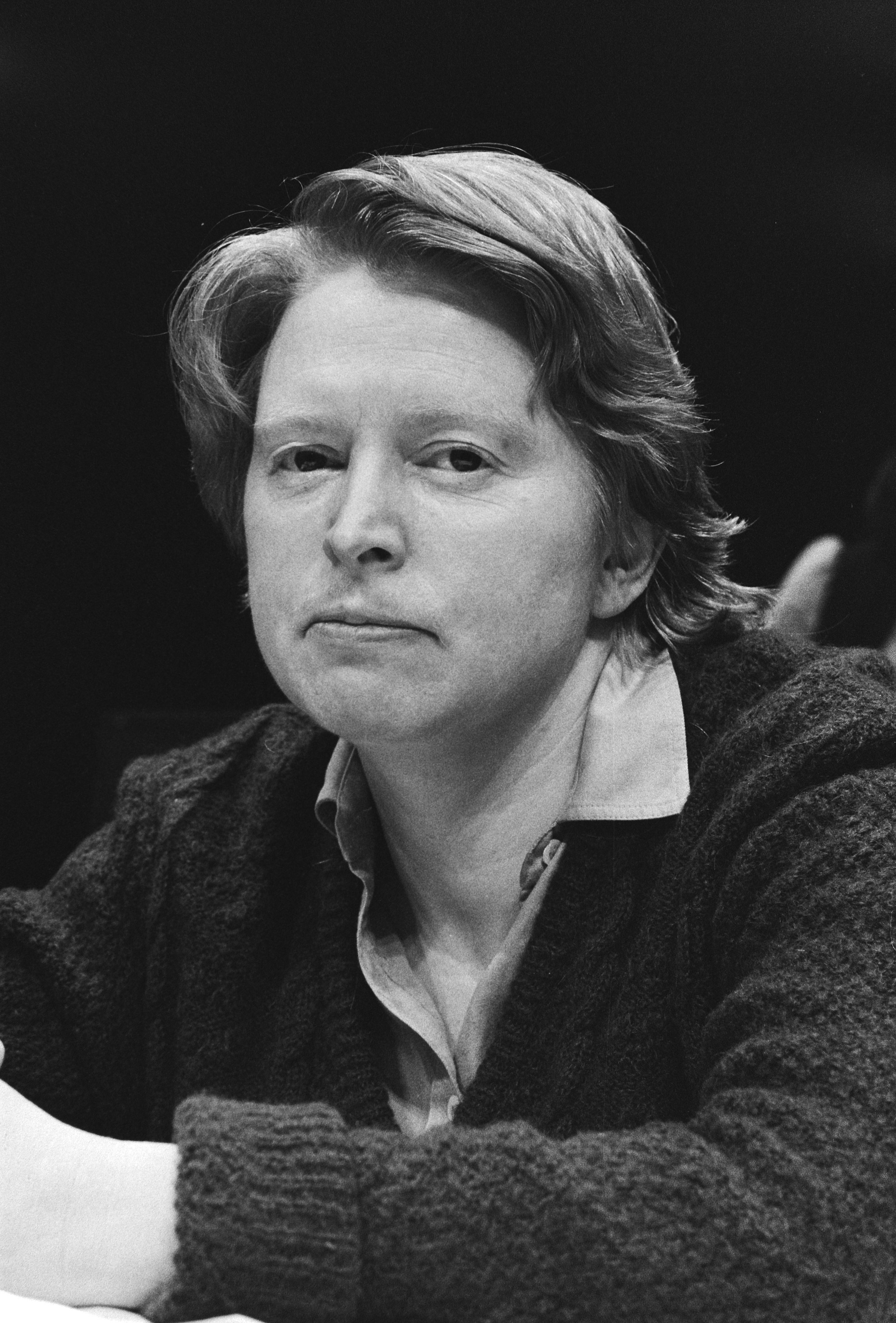 Collectie / Archief : Fotocollectie Anefo Reportage / Serie : [ onbekend ] Beschrijving : Annelien Kappeyne van de Coppello; Algemene vergadering vaststelling verkiezingsprogramma VVD in Flint te Amersfoort Datum : 20 maart 1981 Locatie : Amersfoort Trefwoorden : Vergaderingen, programmas, verkiezingen, voorzitters Persoonsnaam : Annelien Kappeyne van de Coppello Fotograaf : Antonisse, Marcel / Anefo Auteursrechthebbende : Nationaal Archief Materiaalsoort : Negatief (zwart/wit) Nummer archiefinventaris : bekijk toegang 2.24.01.05 Bestanddeelnummer : 931-3843